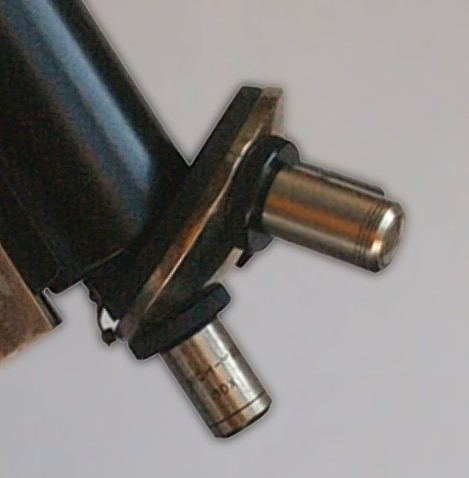 Rewolwer mikroskopu